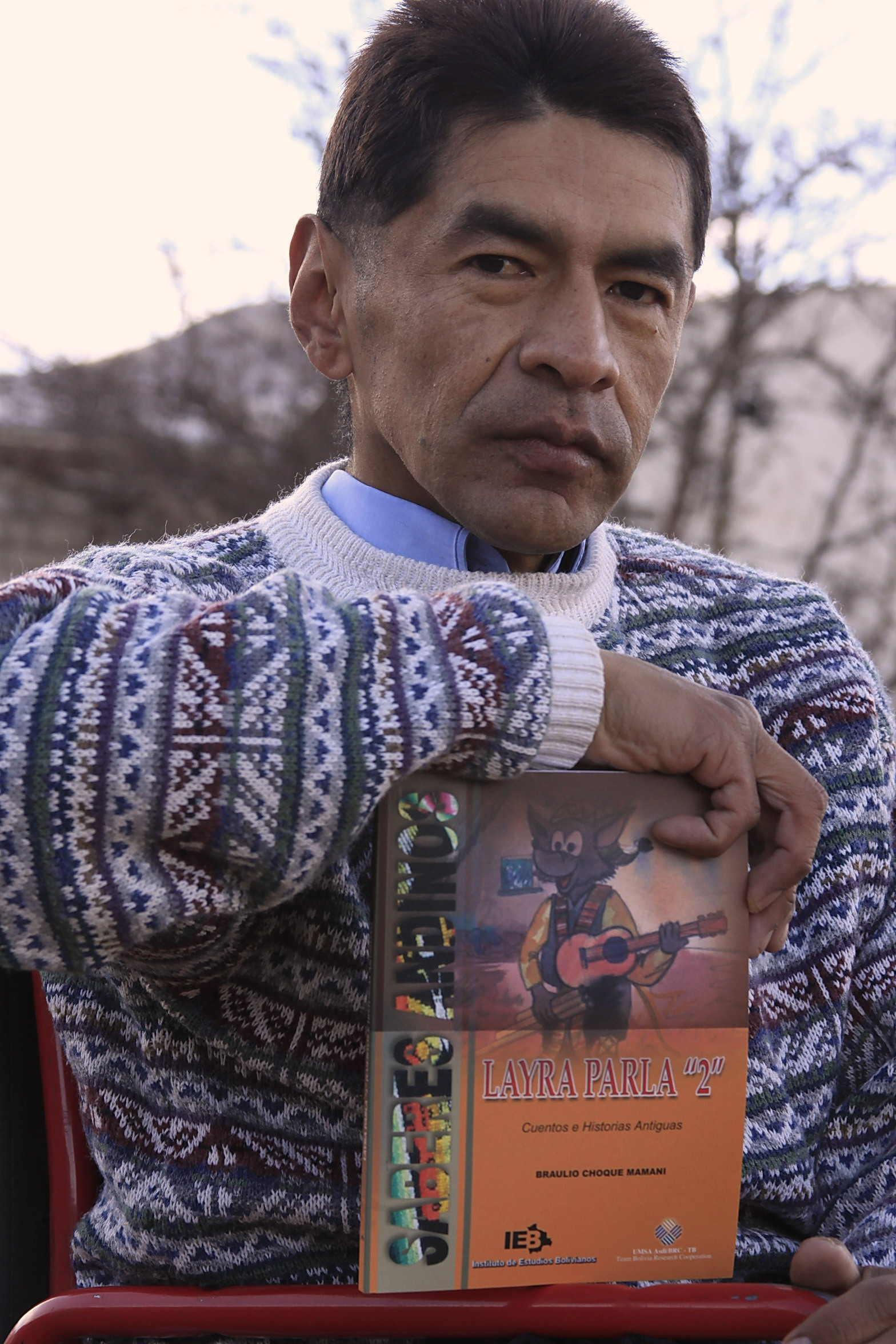 El escritor, pintor y canta autor orureño Braulio Choque